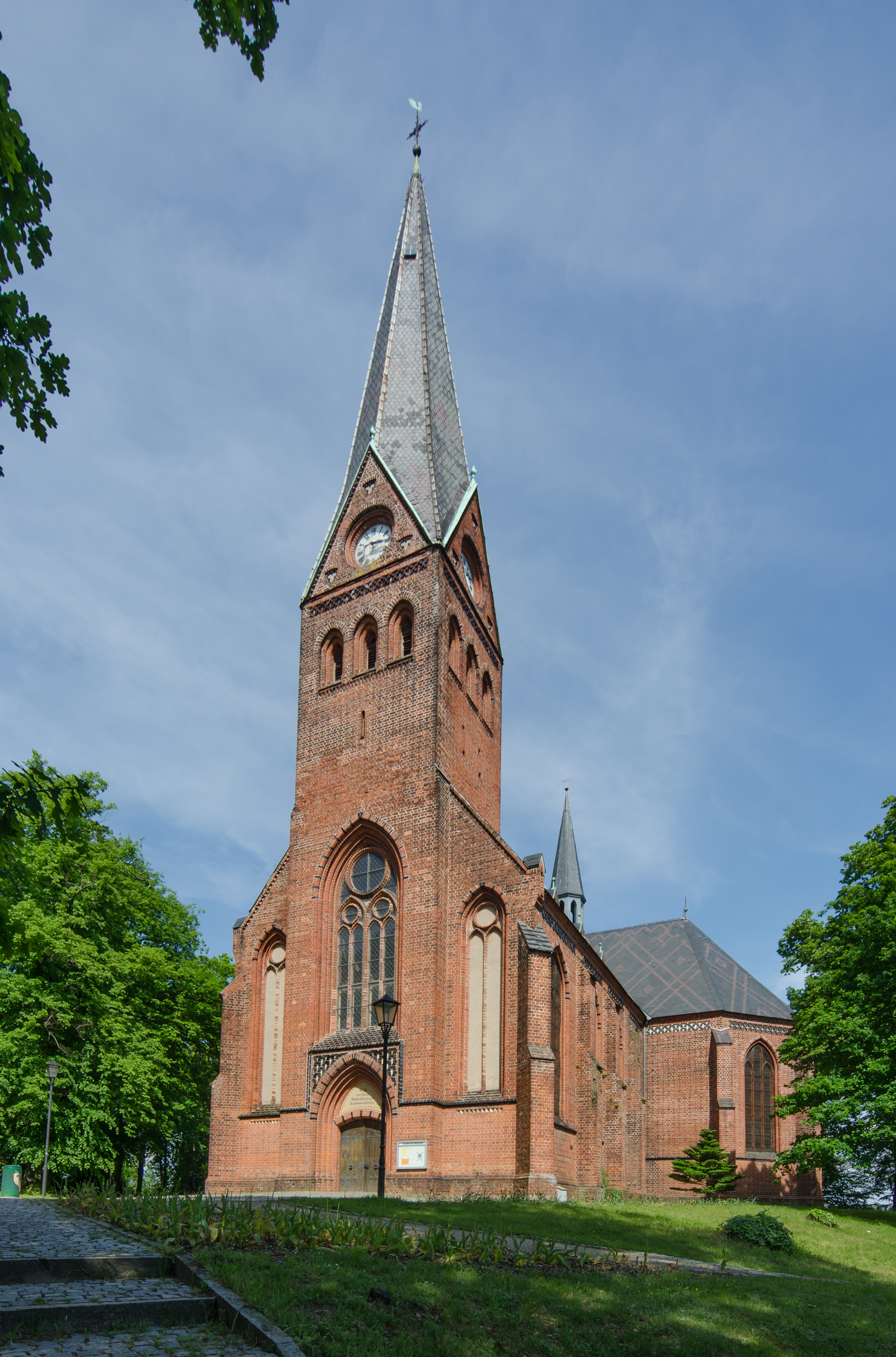 Malchow Stadtkirche von Südwesten